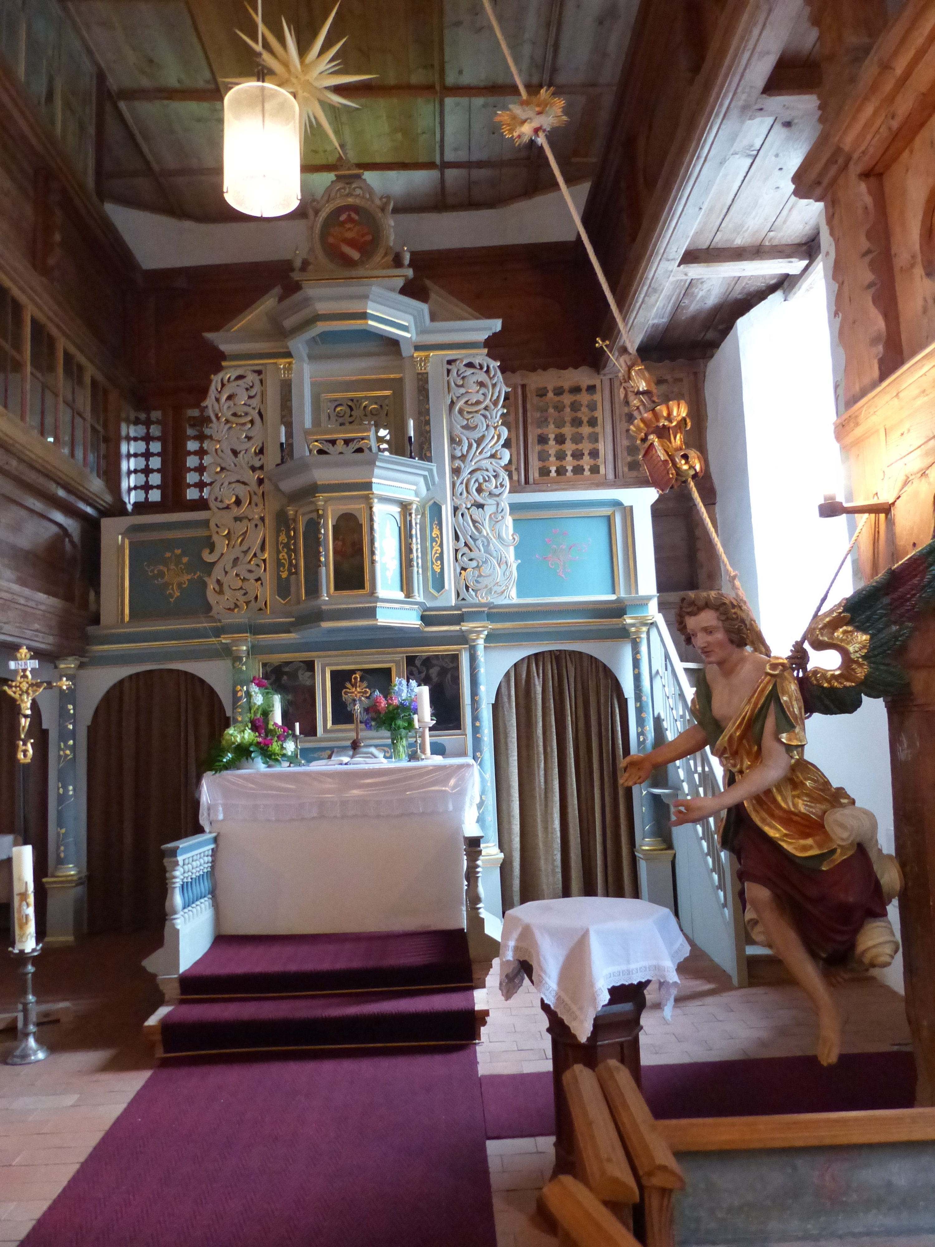 Kirche von Sparnberg, Ortsteil von Hirschberg